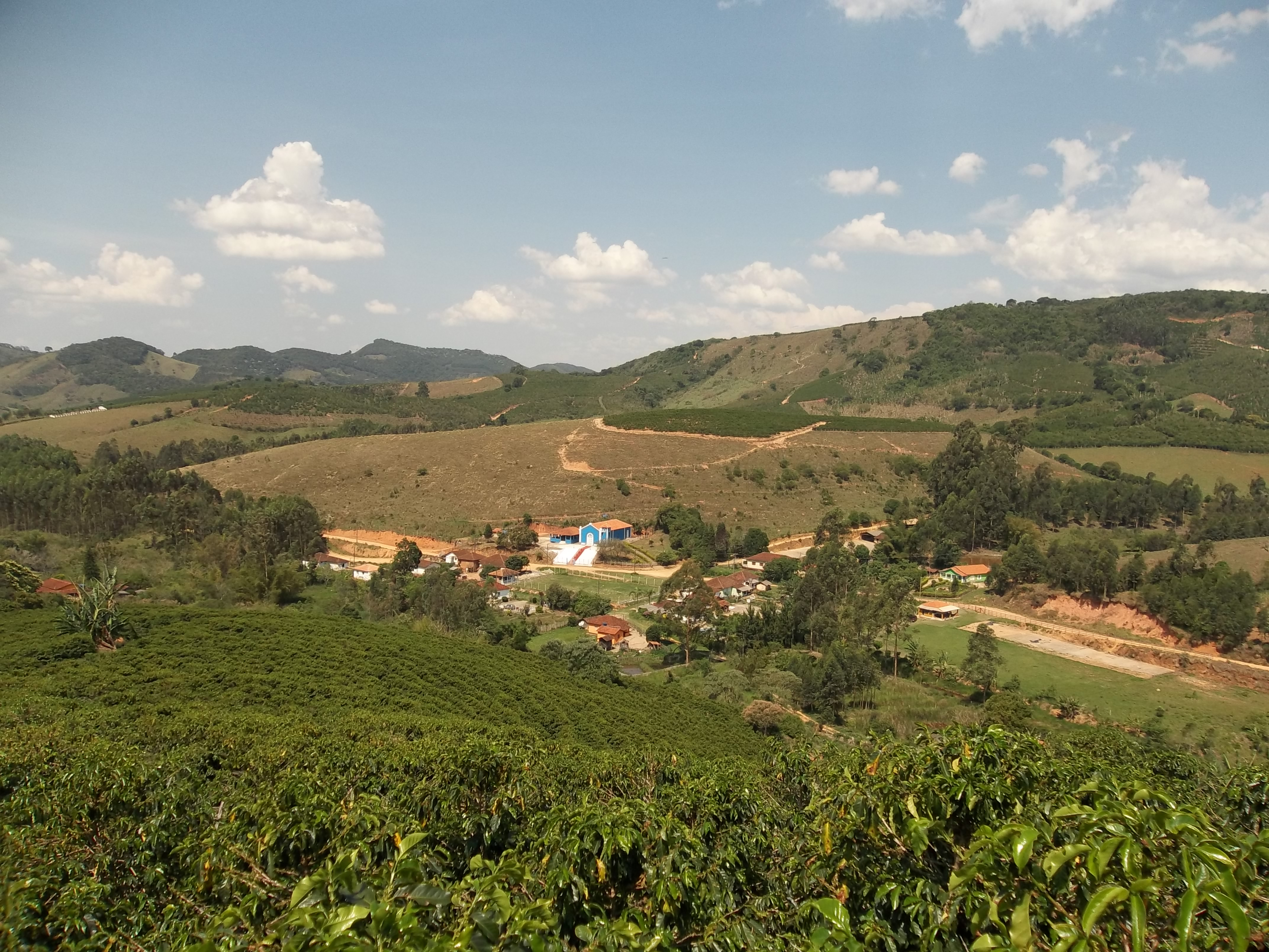 Bairrro Capelinha do Embirizal Lambari - MG - Brasil